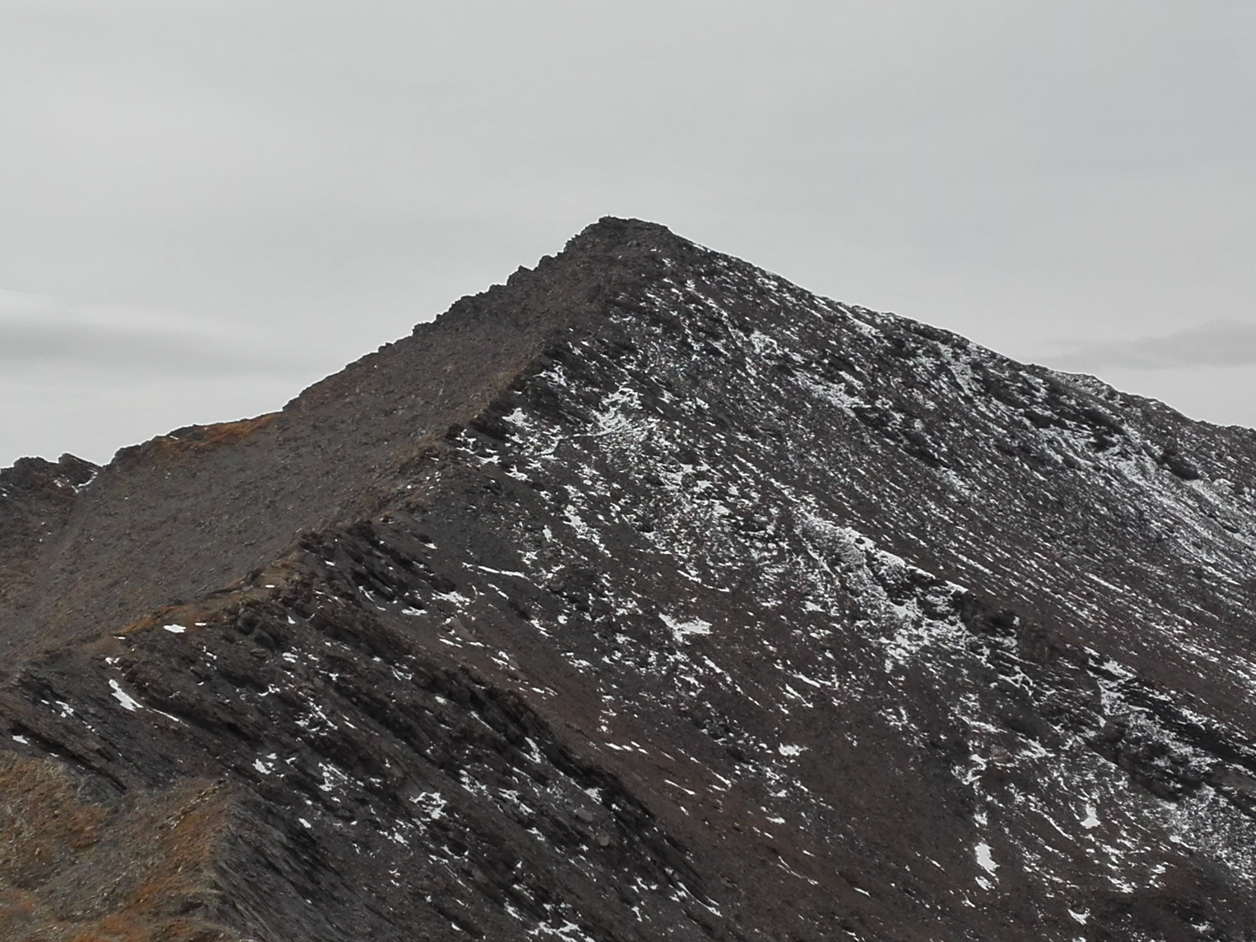 Il Grand Queyron visto dalla sua cresta nord-nordest, cresta che divide la val Germanasca dalla valle Argentera.